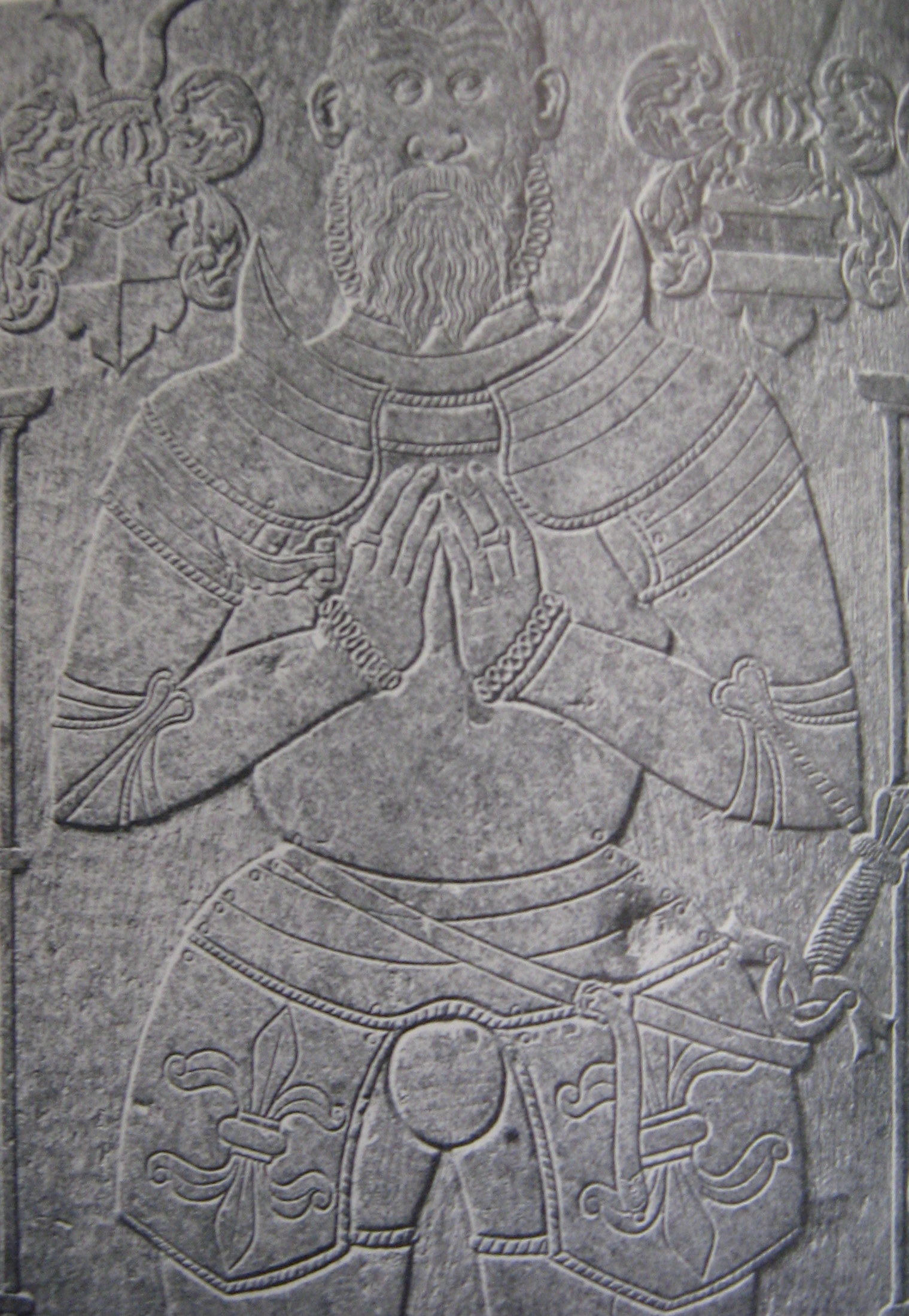 Axel Nilsson Banér (död 1554)s gravsten i Danderyds kyrka.